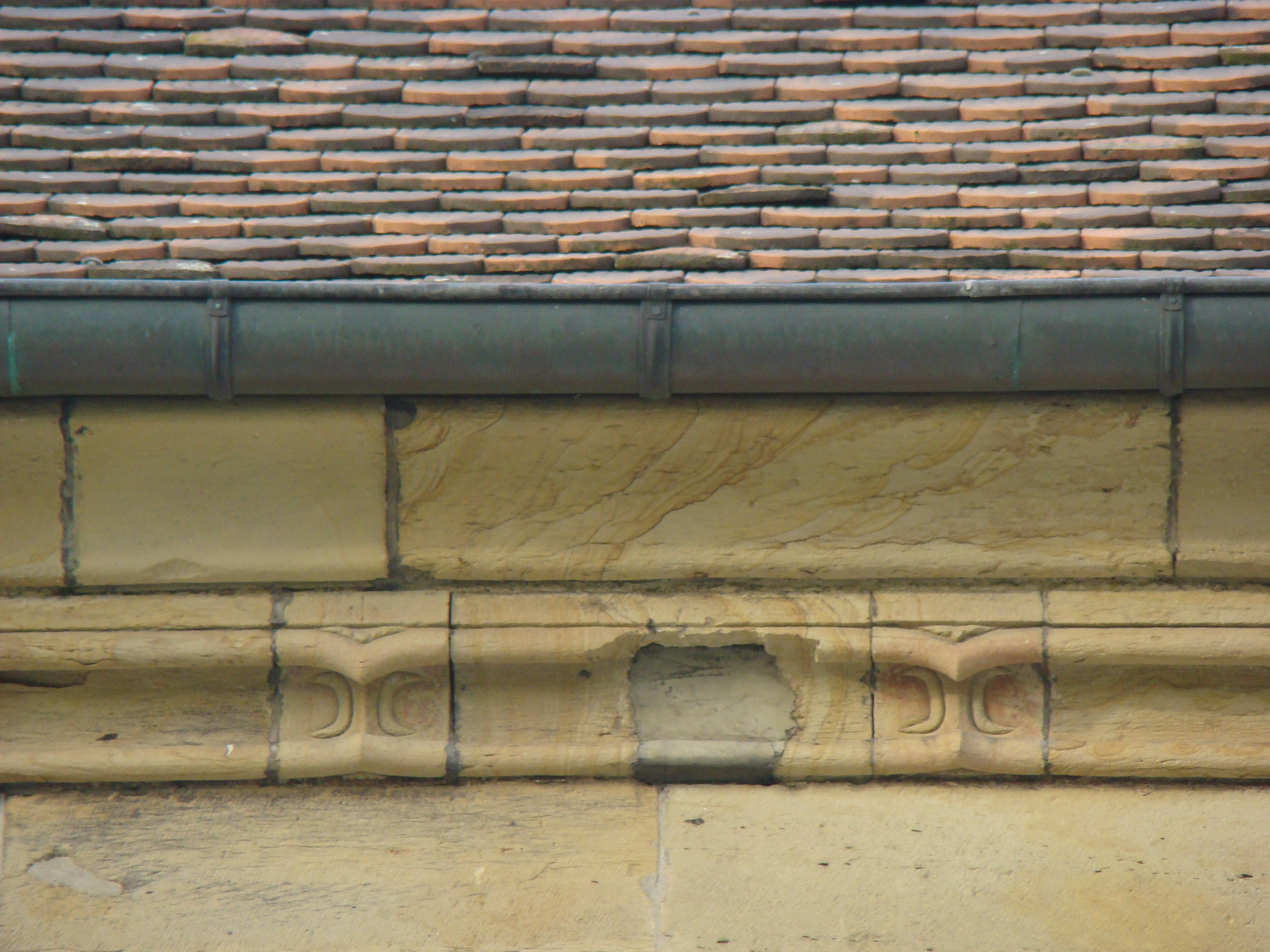 Stift Sinsheim, Stiftskirche